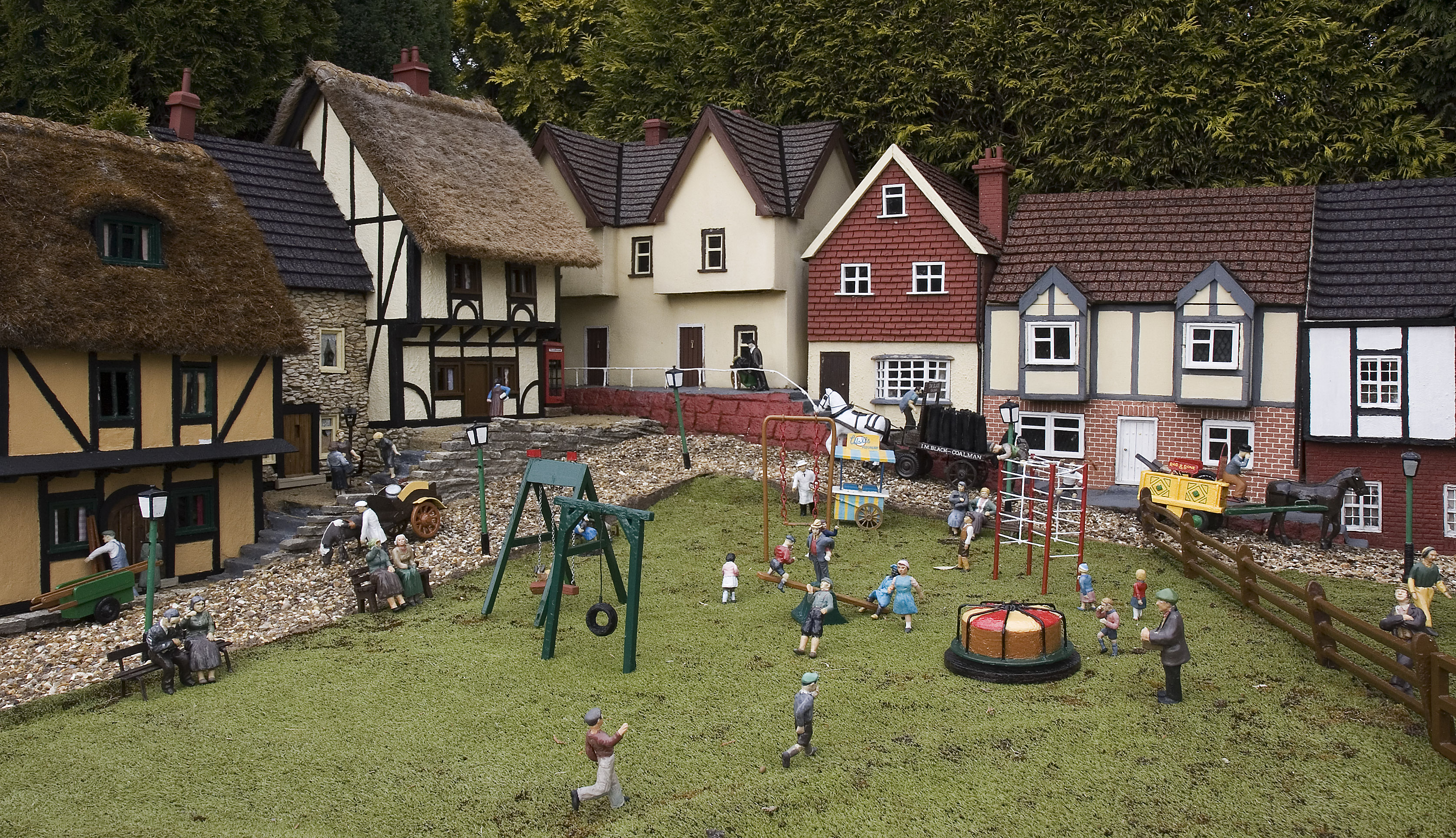 Village green, Bekonscot